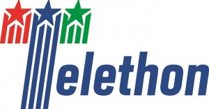 Logo della Fondazione Telethon